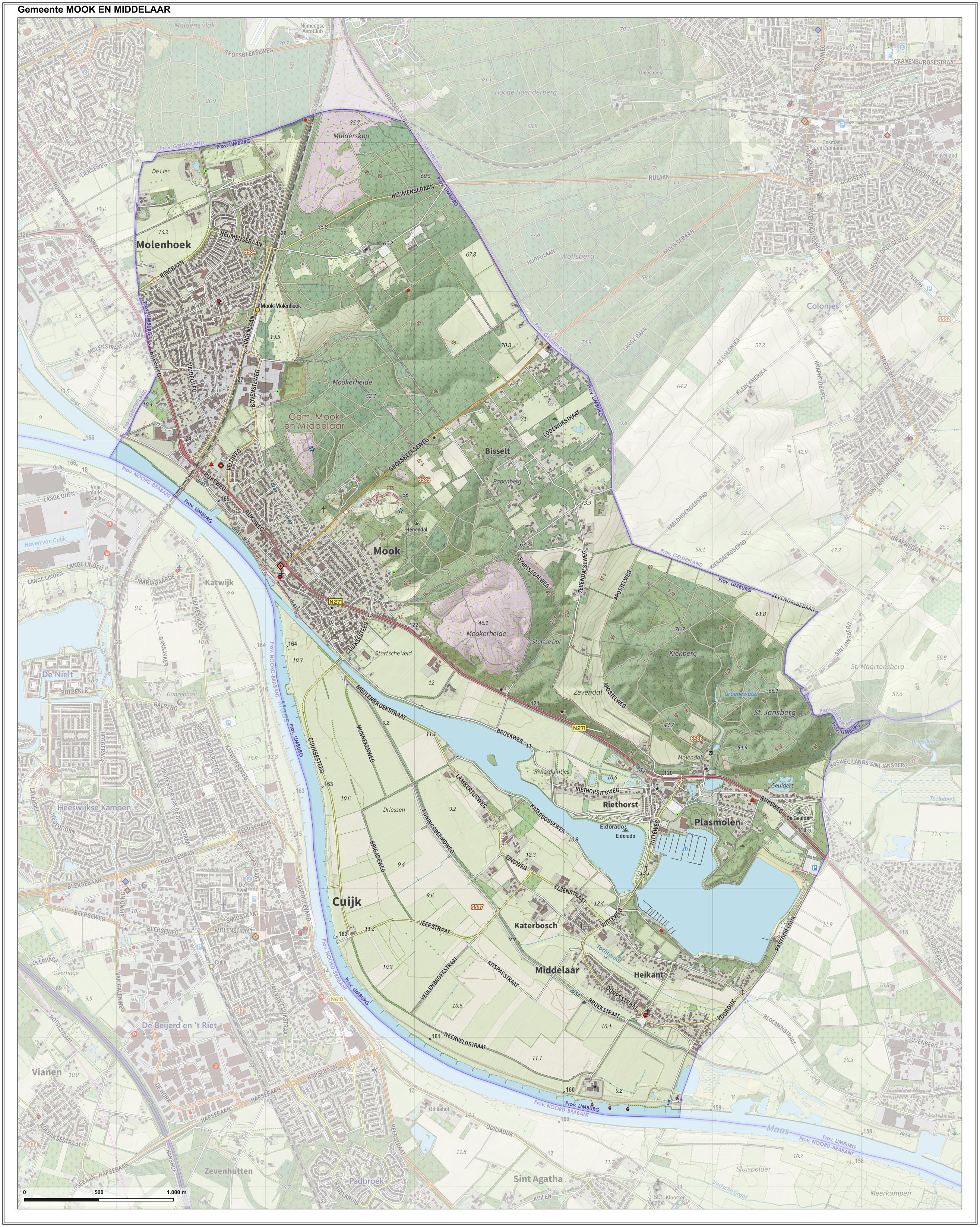 Topografische gemeentekaart. Resolutie: 400 pixels/km. Kaartbeeld samengesteld uit de open geodata van de Top10NL en Top25namen (Kadaster), Creative Commons-BY licentie. Gebouwvlakken uit open geodata BAG extract. Wegen uit de OpenStreetMap, OpenStreetMap community. Reliëfschaduw uit de Actuele Hoogtekaart AHN2. Samenstelling en kleurenschema: Jan-Willem van Aalst, met QGIS. Zie ook de Legenda.